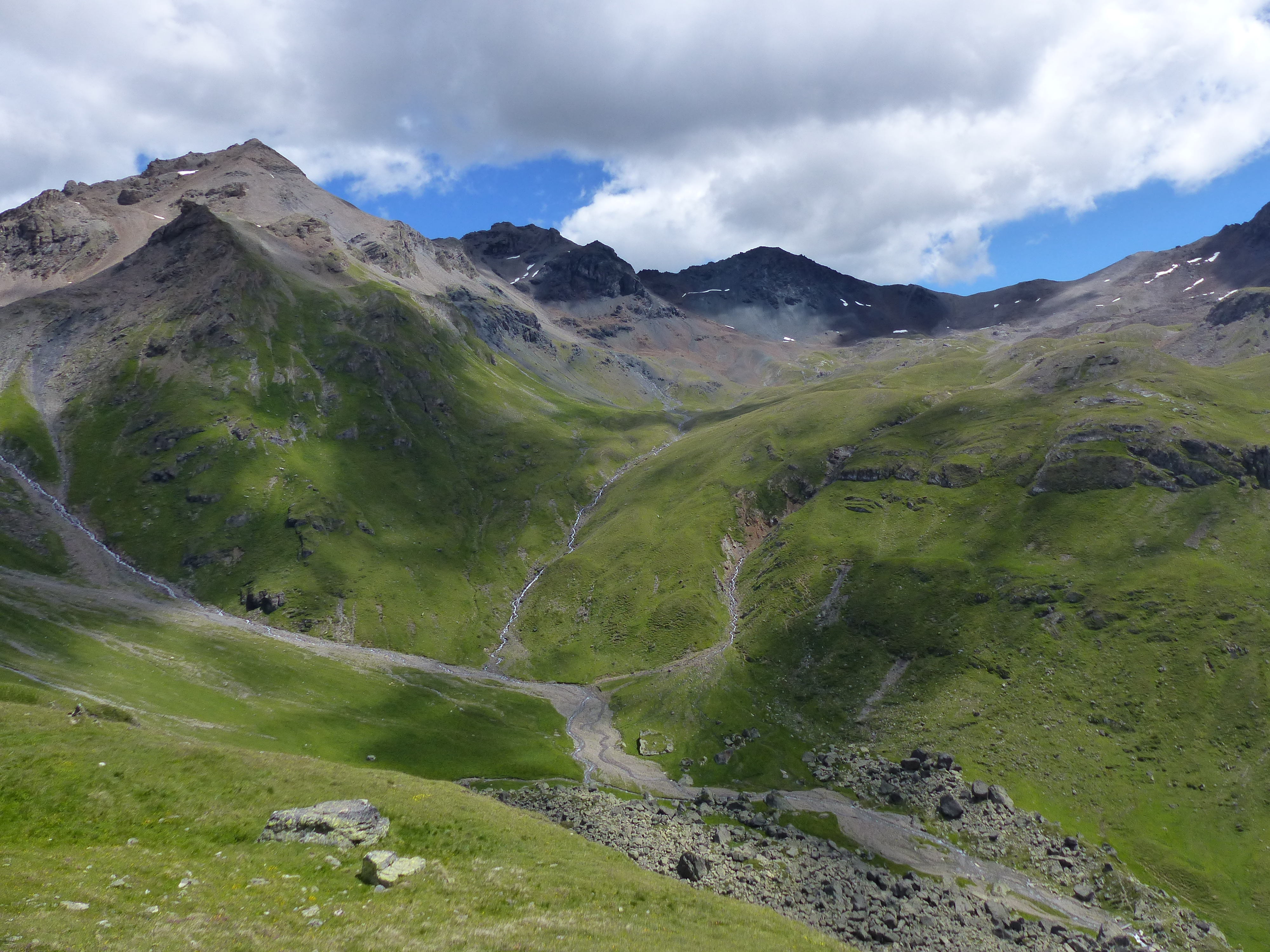 Piz Tasna (links). Im Vordergrund das Val Urschai